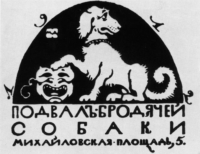 Stray_dog_logo